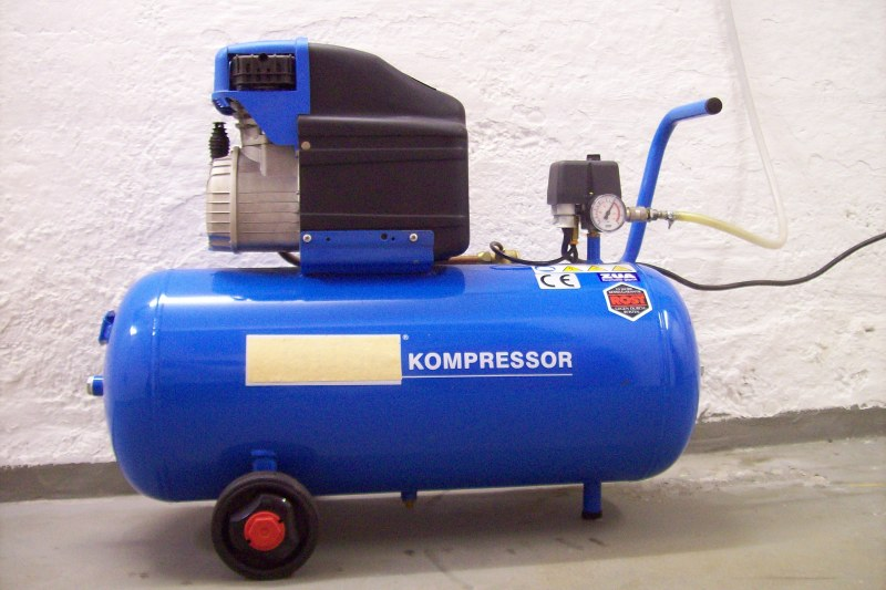 Kolbenkompressor mit Kessel zur Drucklufterzeugung